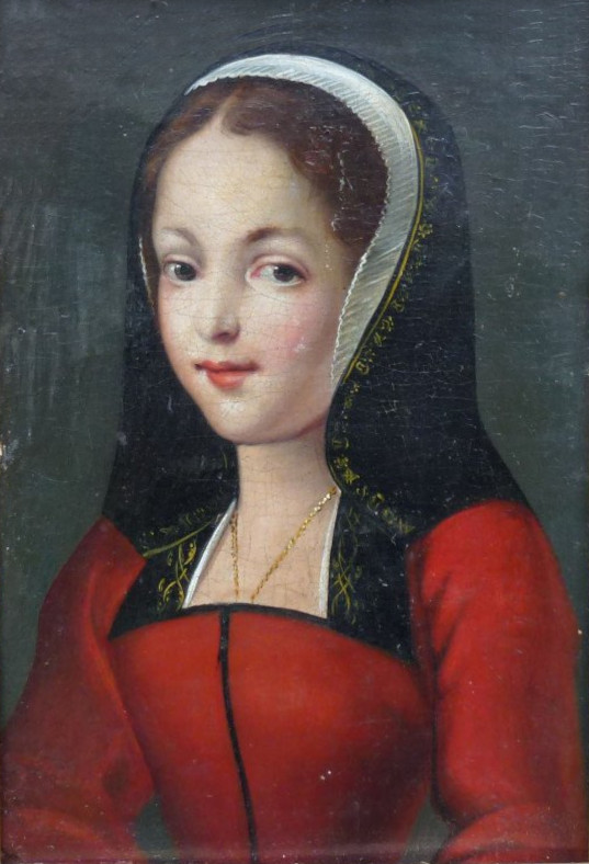 Juana la loca as child